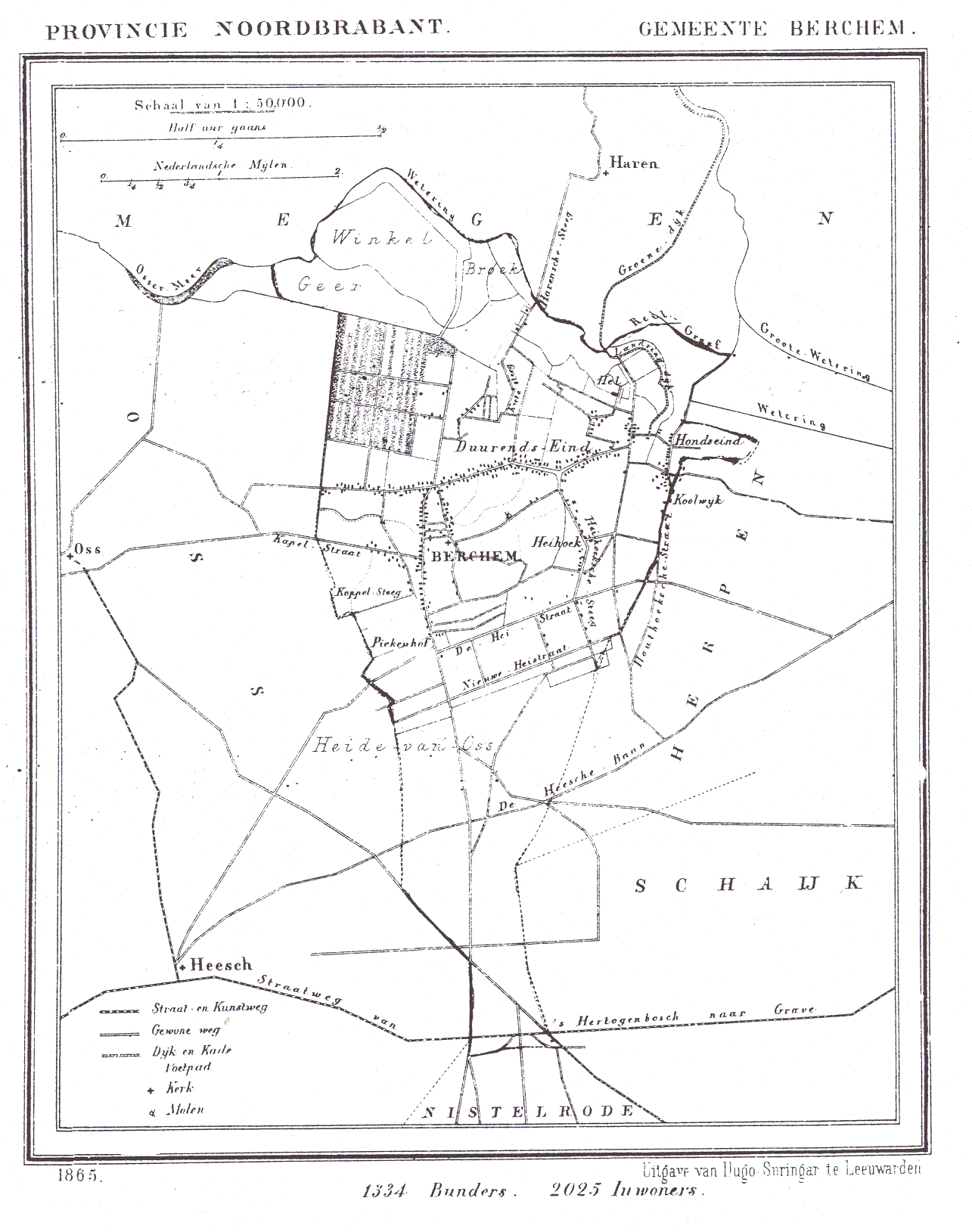 Nederland, Noord-Brabant, Gemeente Berghem